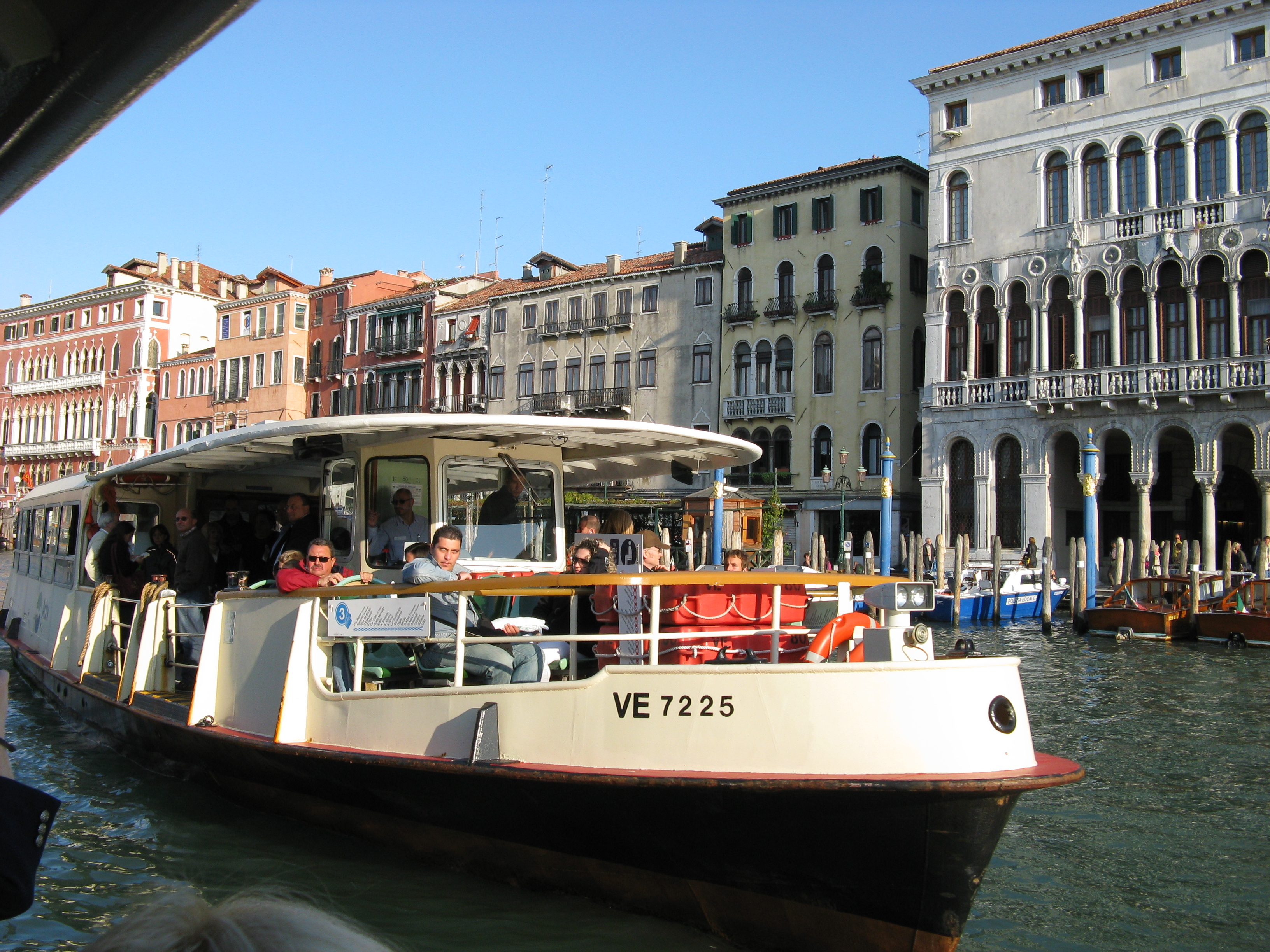 Vaporetto (Venezia, it)